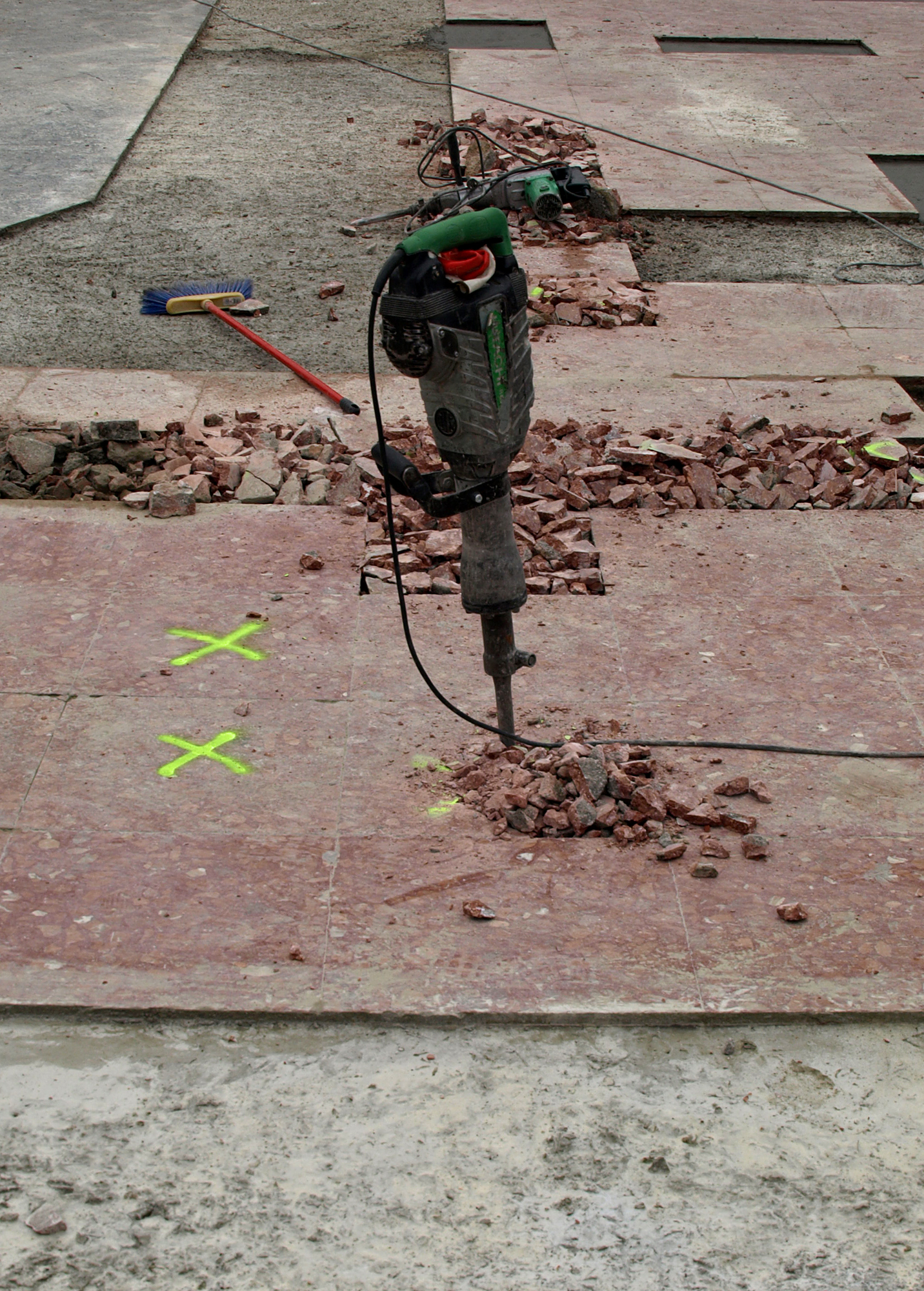 Remodelación de la Plaza Cataluña 2008 - Martillo rompepavimentos / Jackhammer